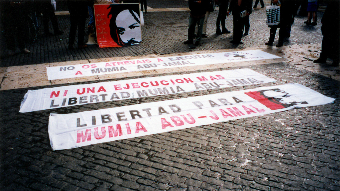 manifestación en plaça Sant Jaume (Barcelona) pro libertad Mumia